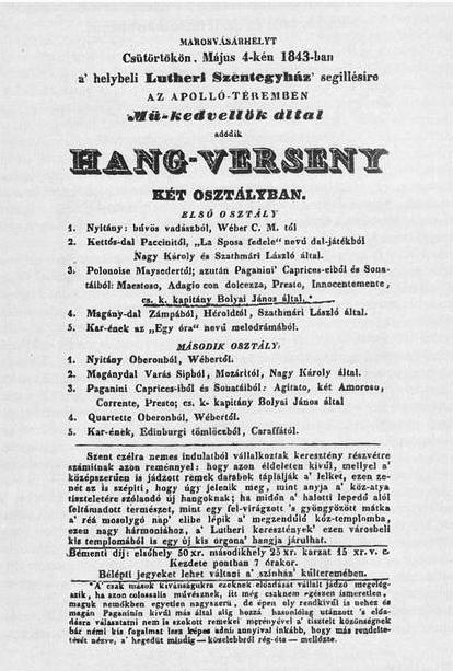 Műkedvelő hangverseny plakátja 1843-ból (Marosvásárhely); egyik fellépő Bolyai János